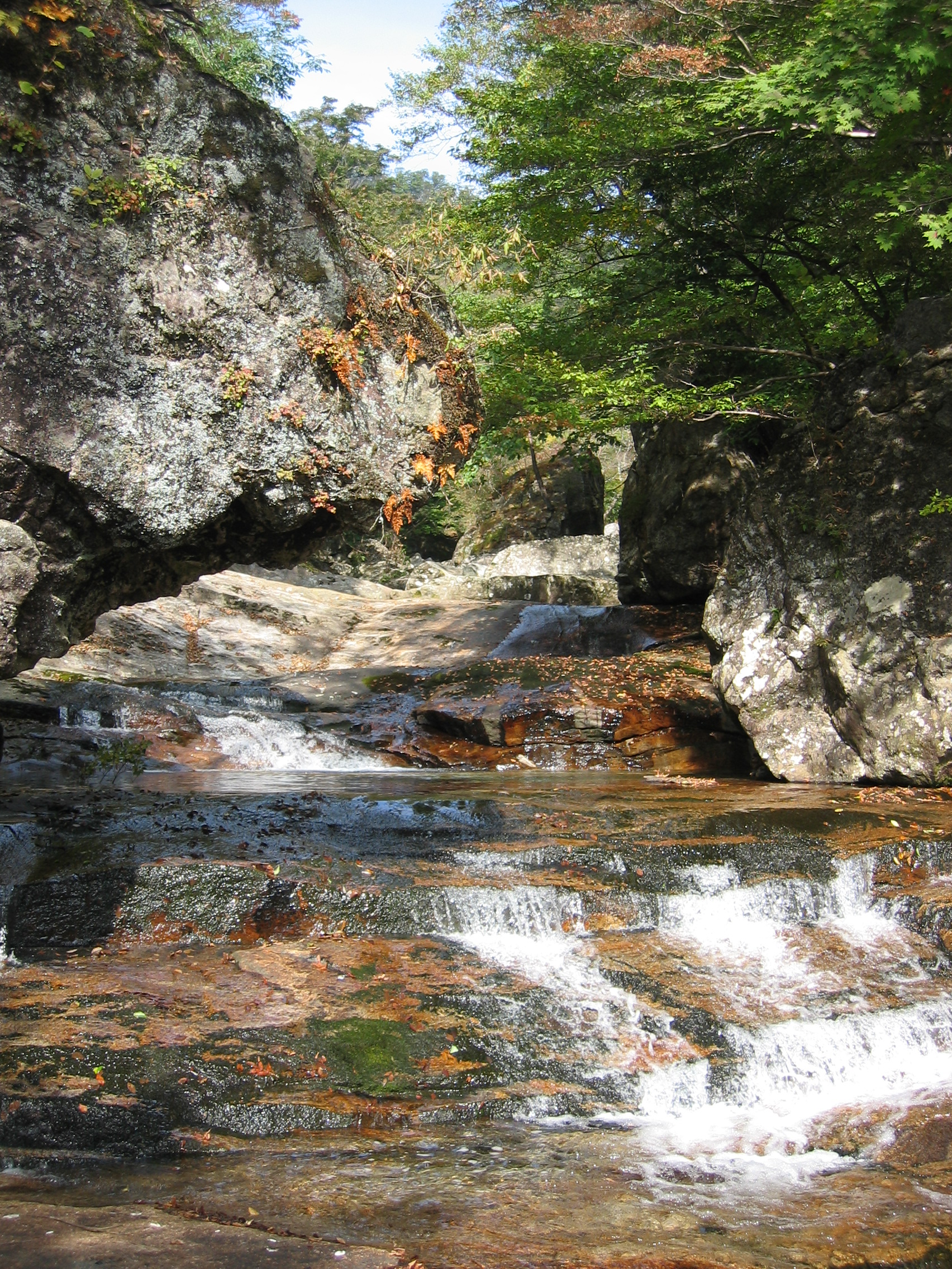 2006년 대한민국 지리산의 모습 The scenery of Jirisan, in South Korea, 2006